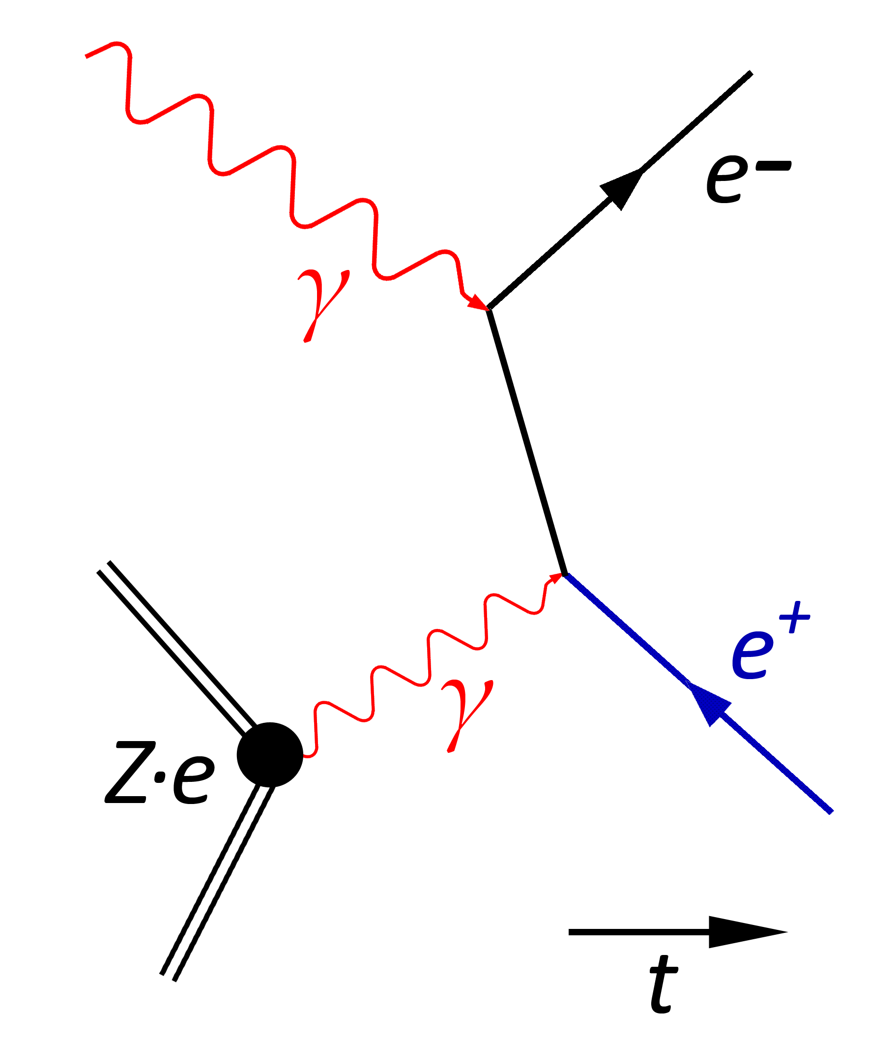 Schematische Darstellung des Paarbildungseffektes am Beispiel der Erzeugung eines Elektron-Positron-Paares in Anwesenheit eines Kernes.